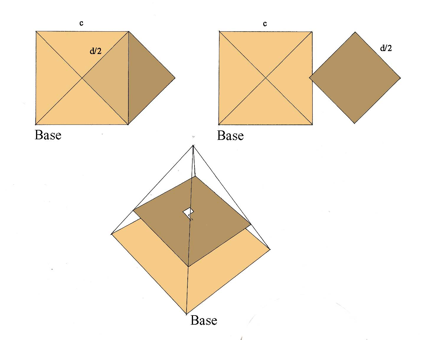 Relations de surfaces de la pyramide de Khéops